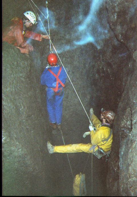 Description Spéléologie - remontée du puits (Mine en Alsace - France) Date16 November 2005SourcePhoto prise par La CigaleAuthorLa CigalePermission (Reusing this file) libre utilisation Spéléologie - remontée du puits (Mine en Alsace - France)